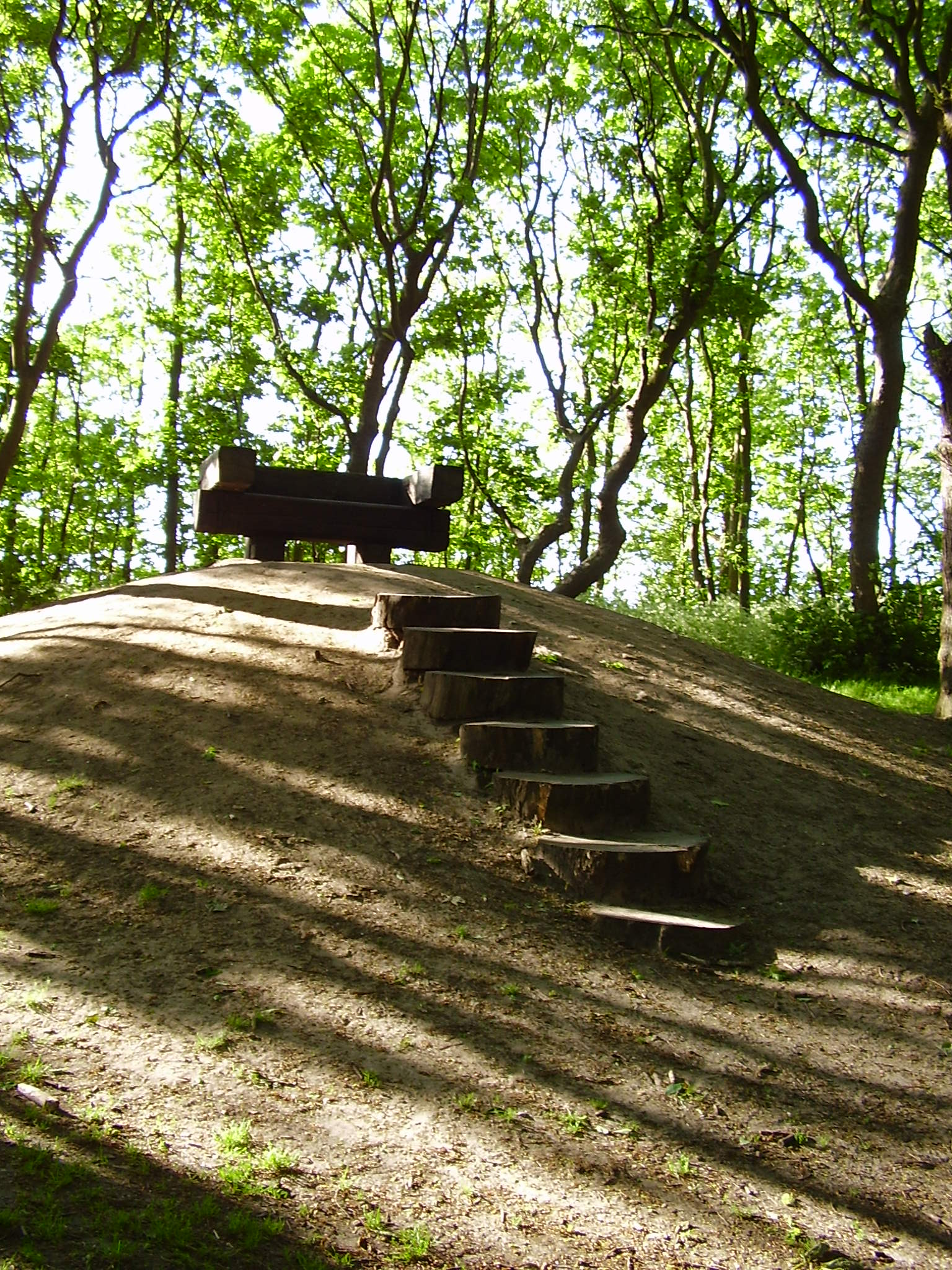 De zeven pannenkoeken naar de top van de bult waaronder de Engelse steen zou liggen in het bosje Doolhof op Texel